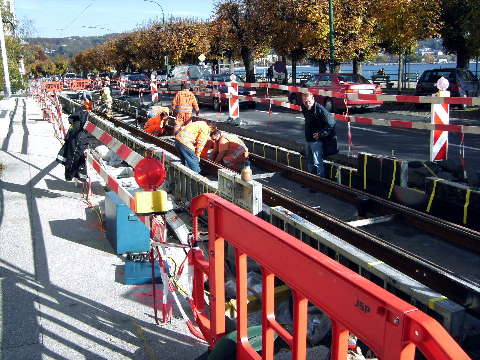 Sanierung der Esplanaden-Gleise (Straßenbahn Gmunden)